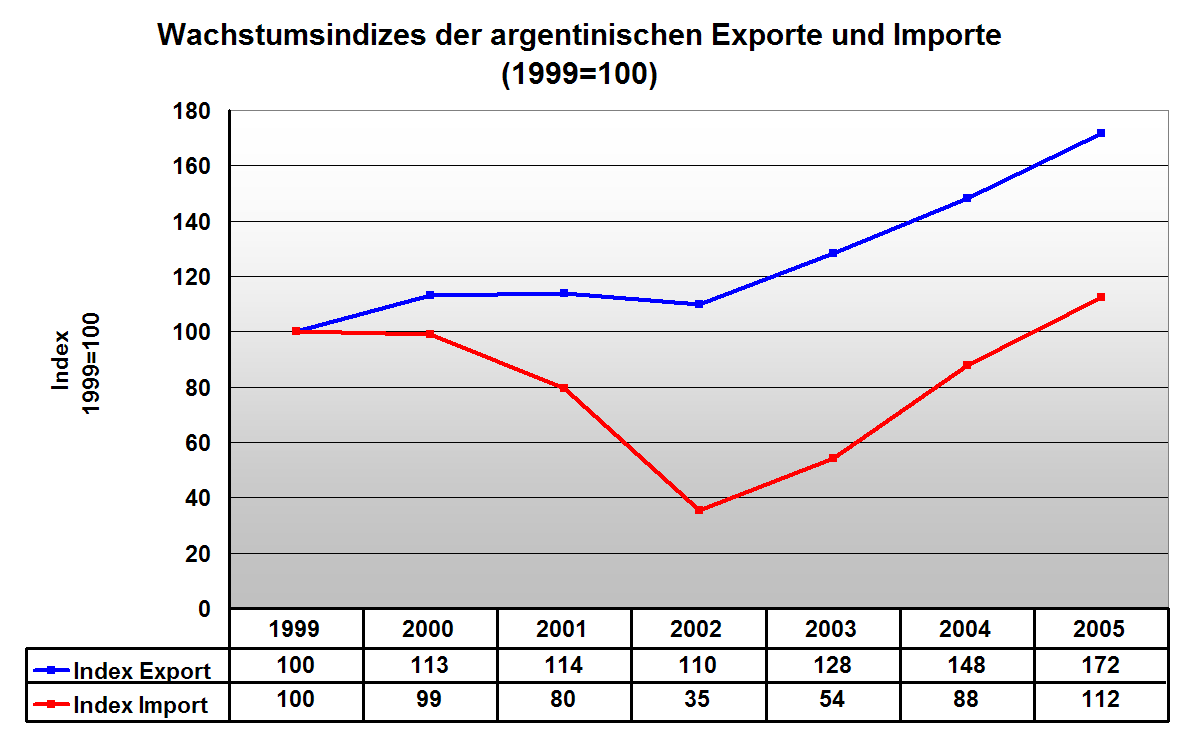 Foreign Trade of Argentina 1999-2005; Außenhandel Argentiniens 1999-2005